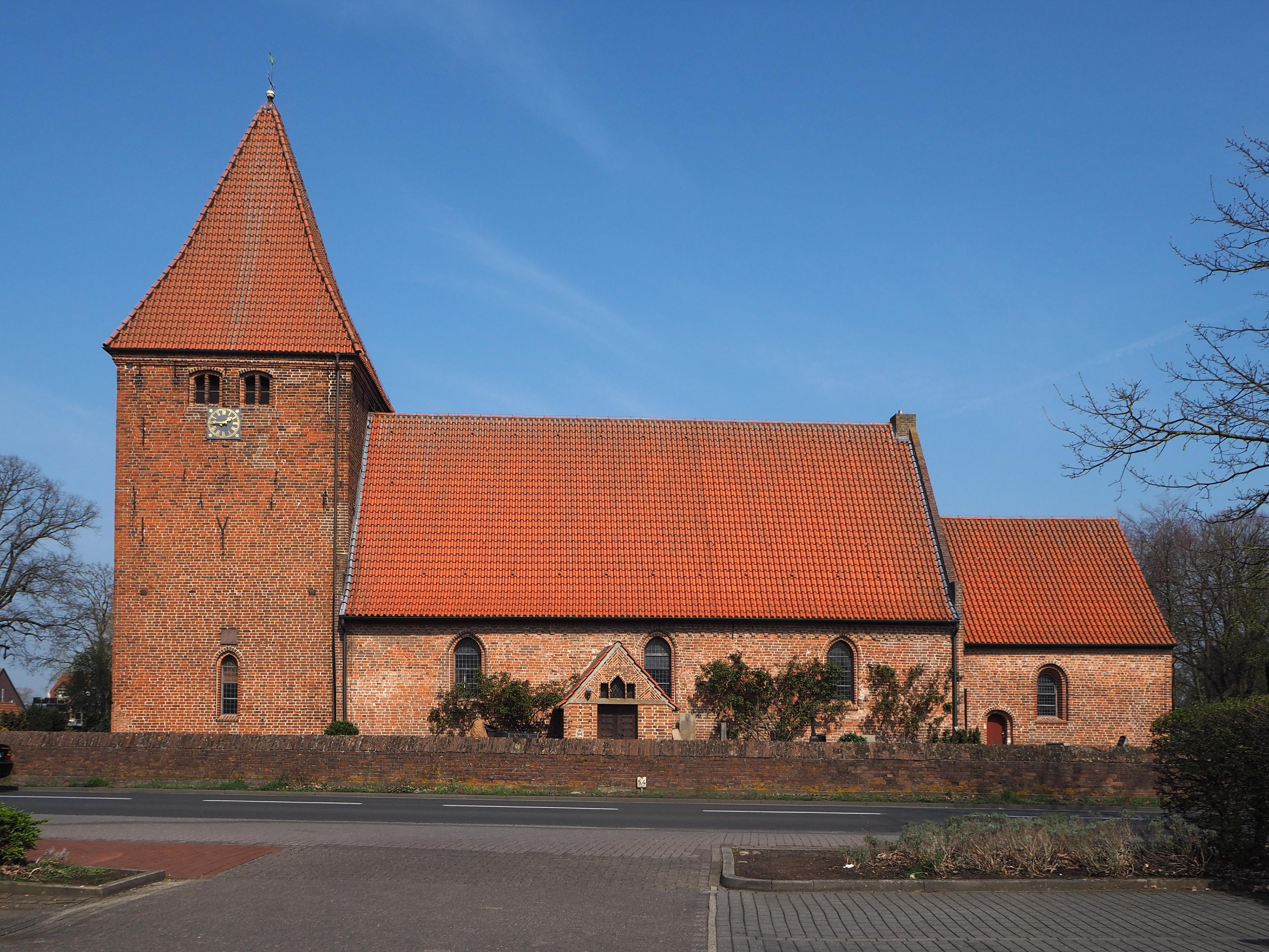 Stuhr (Niedersachsen) - St.-Pankratius Kirche von Süden - 13. Jh.